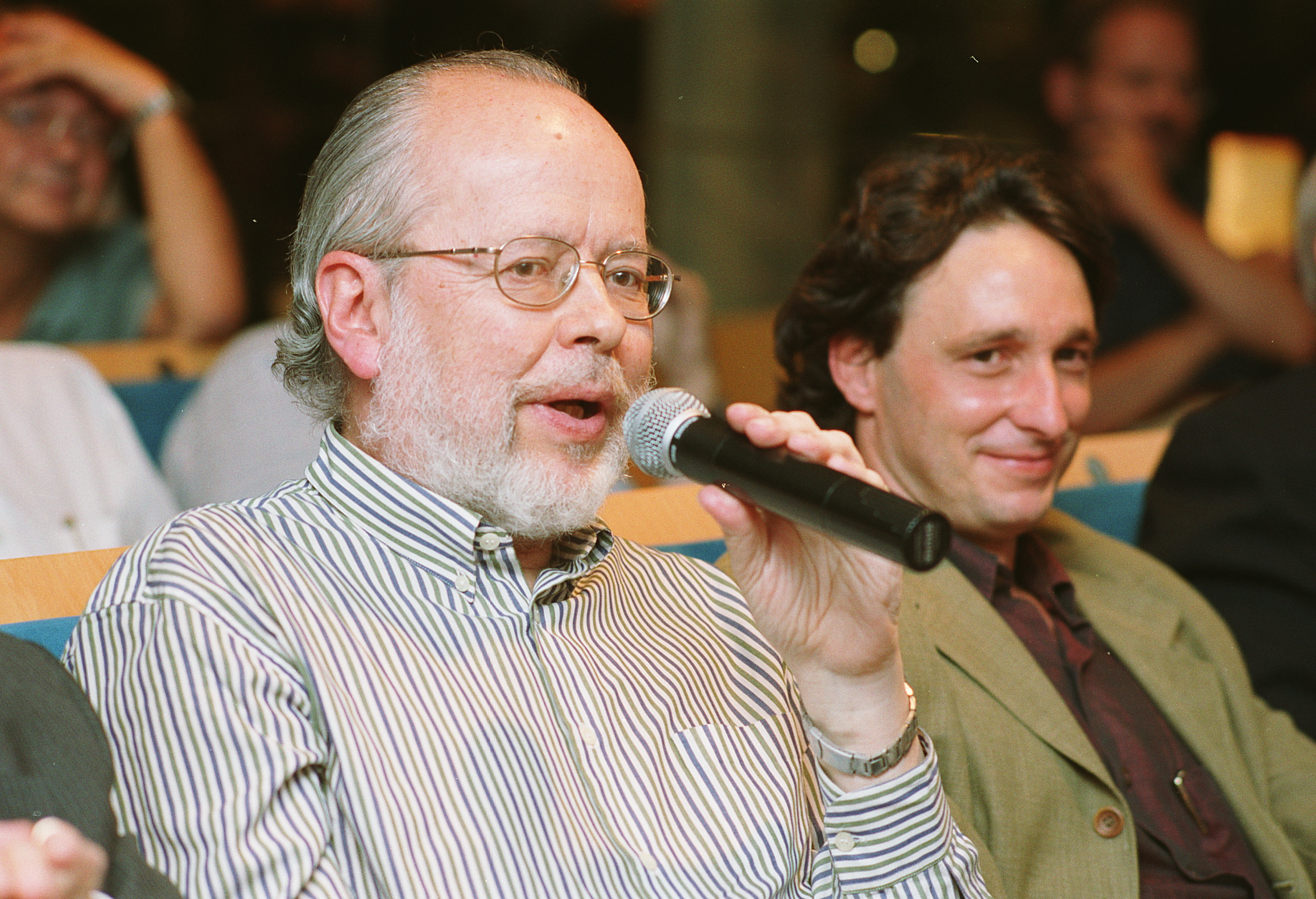 Xirinachs al MHC el 2001. A la dreta Jordi Portabella.